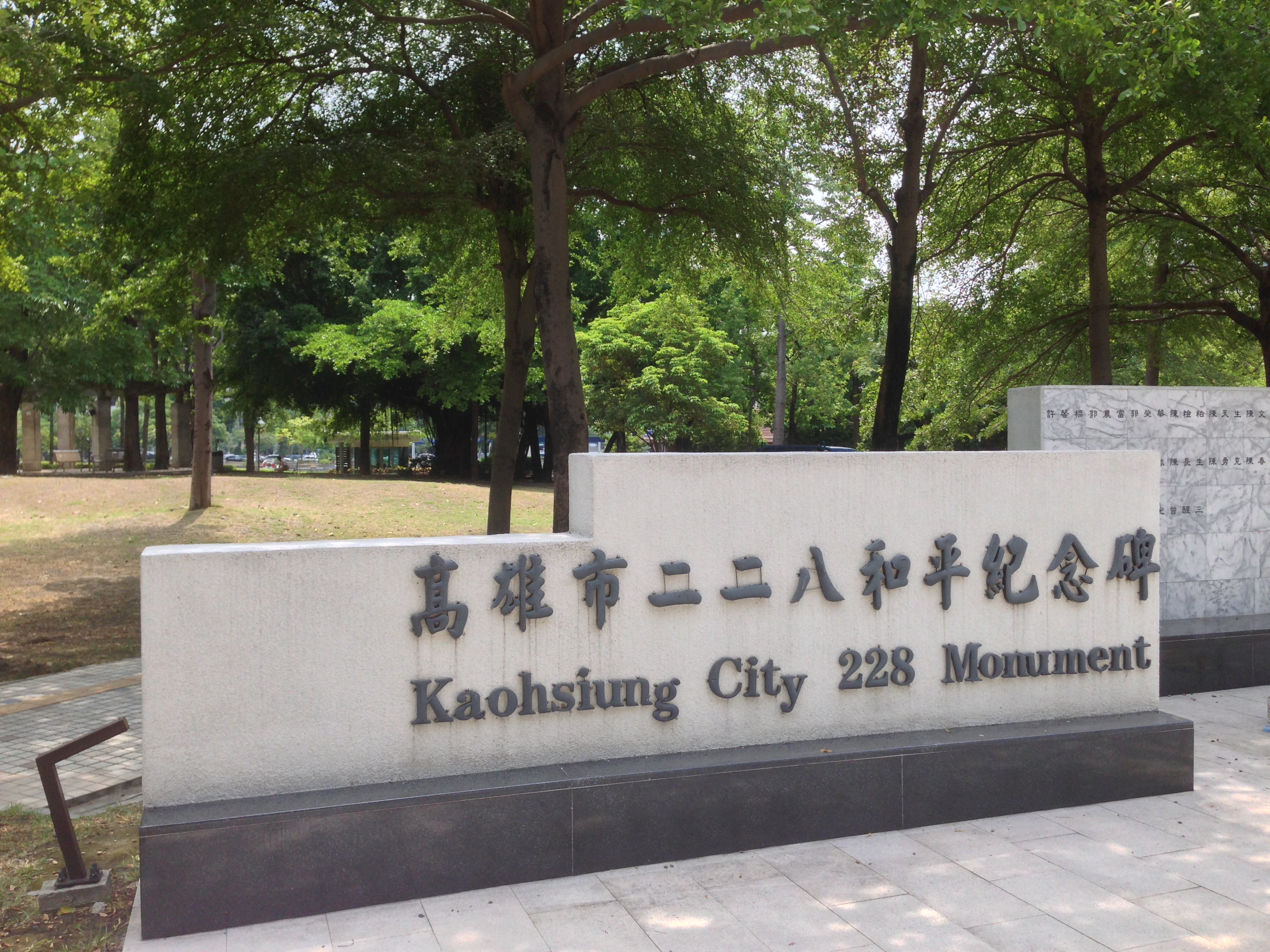 高雄市二二八和平紀念碑，位於高雄市二二八和平紀念公園，2006年立。